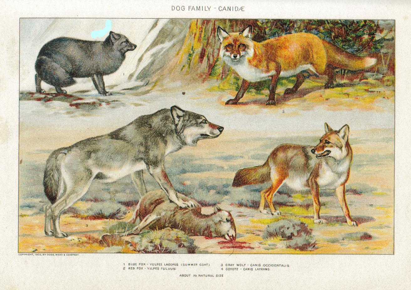 Painting